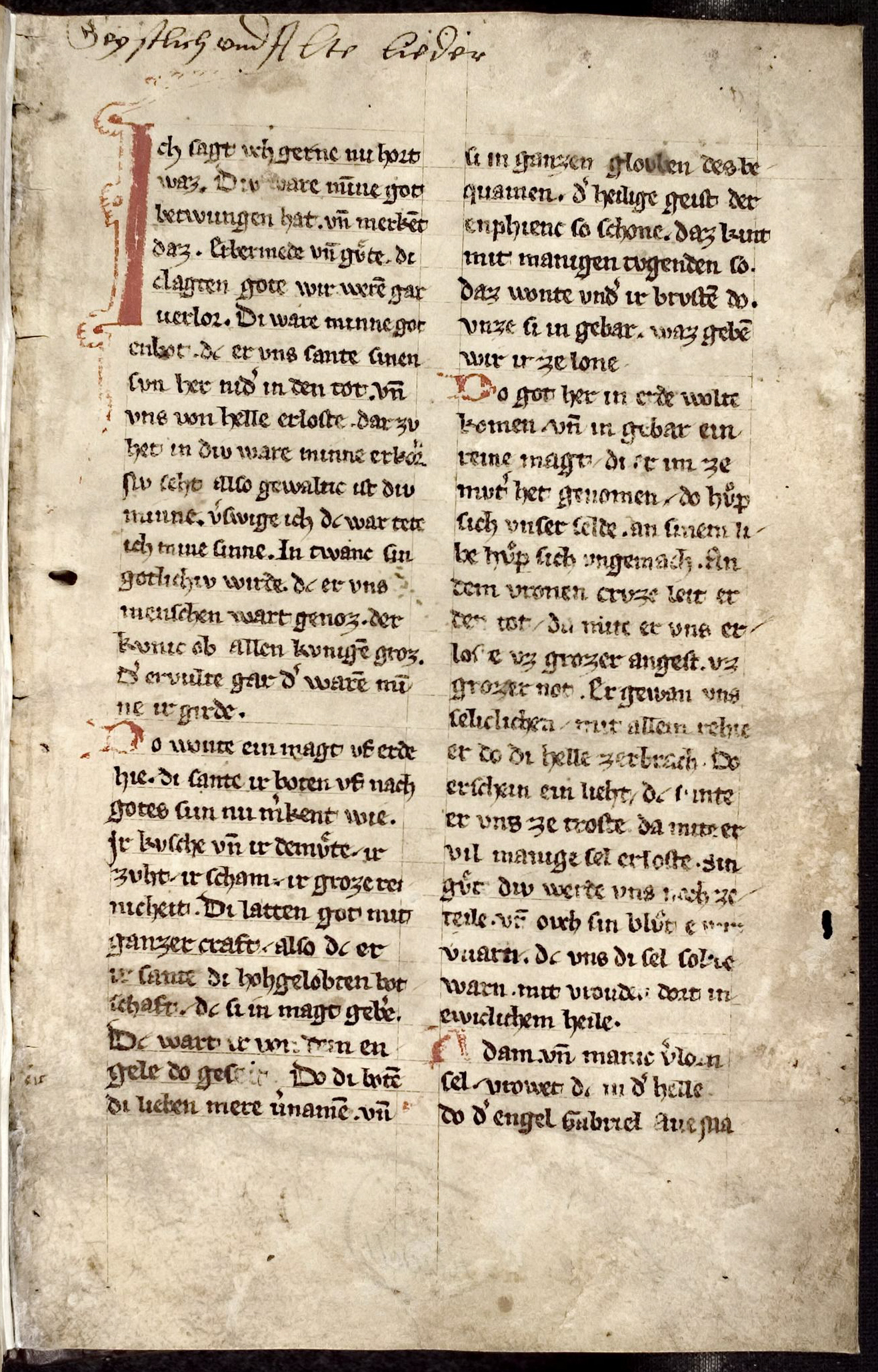 Heidelberger Liederhandschrift cpg 350; Universitätsbibliothek Heidelberg, cpg 350, fol. 1r